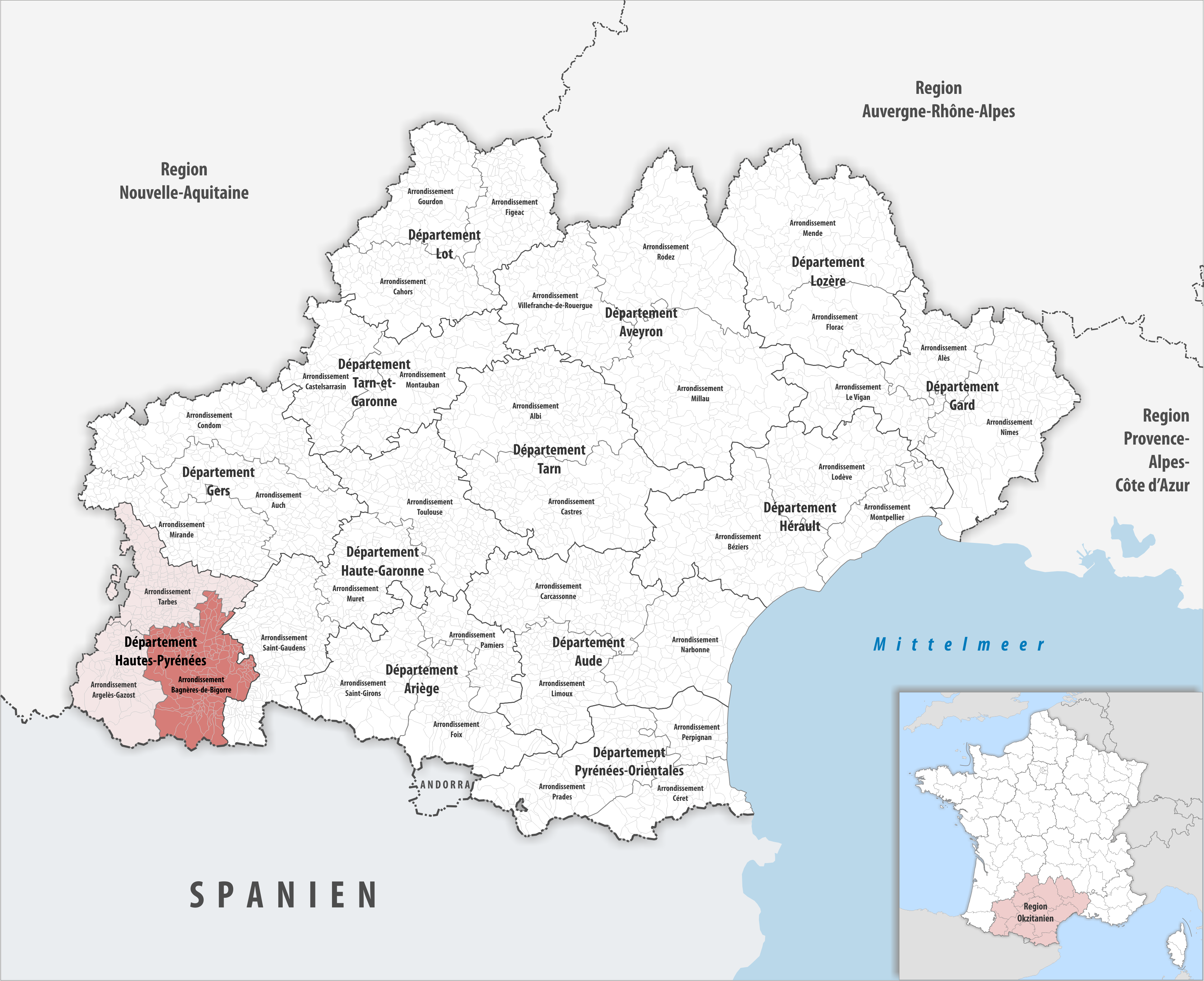 Lage des Arrondissements Bagnères-de-Bigorre